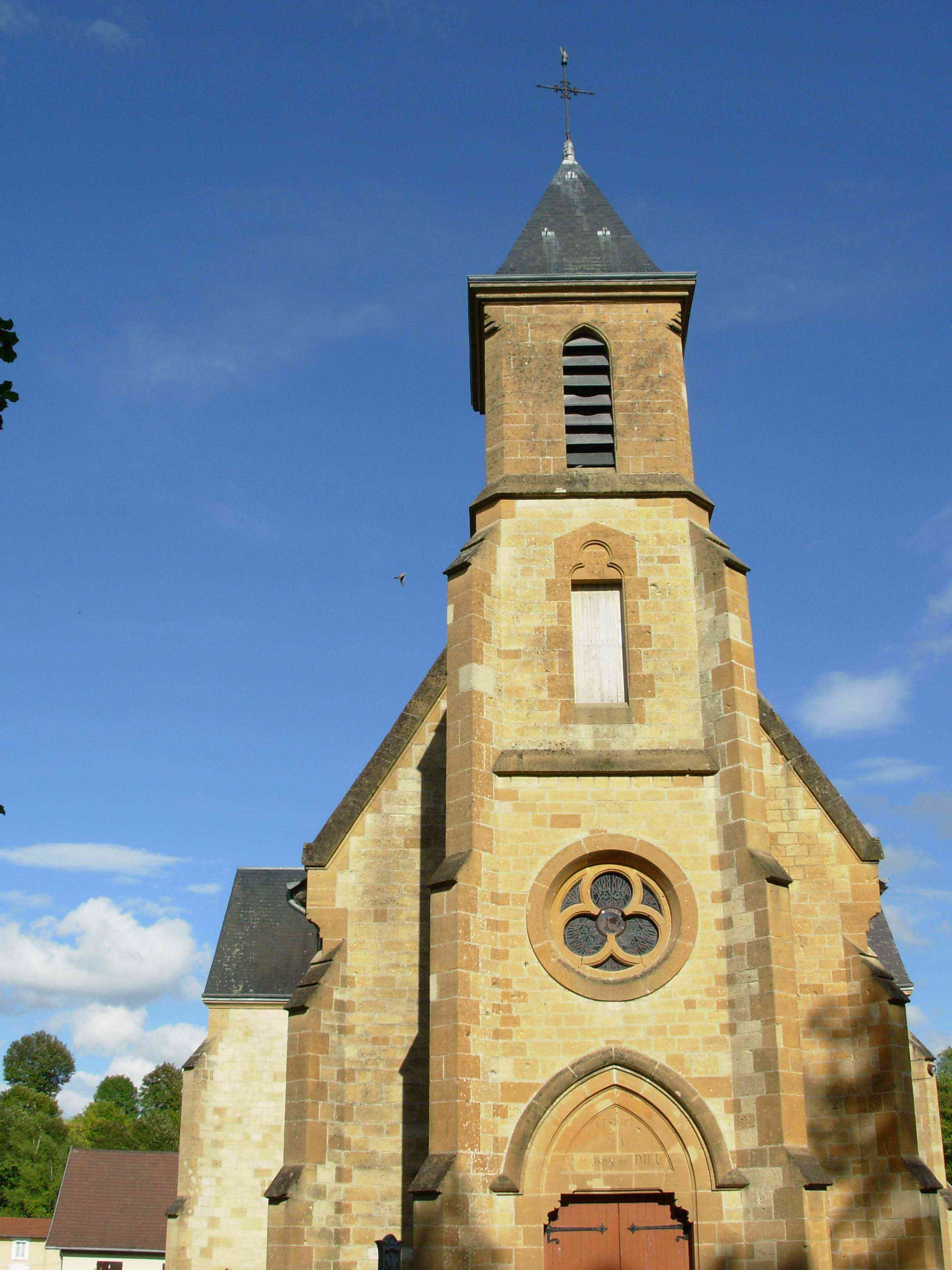 Photographie personnelle de l'église de Semide (village des ardennes)